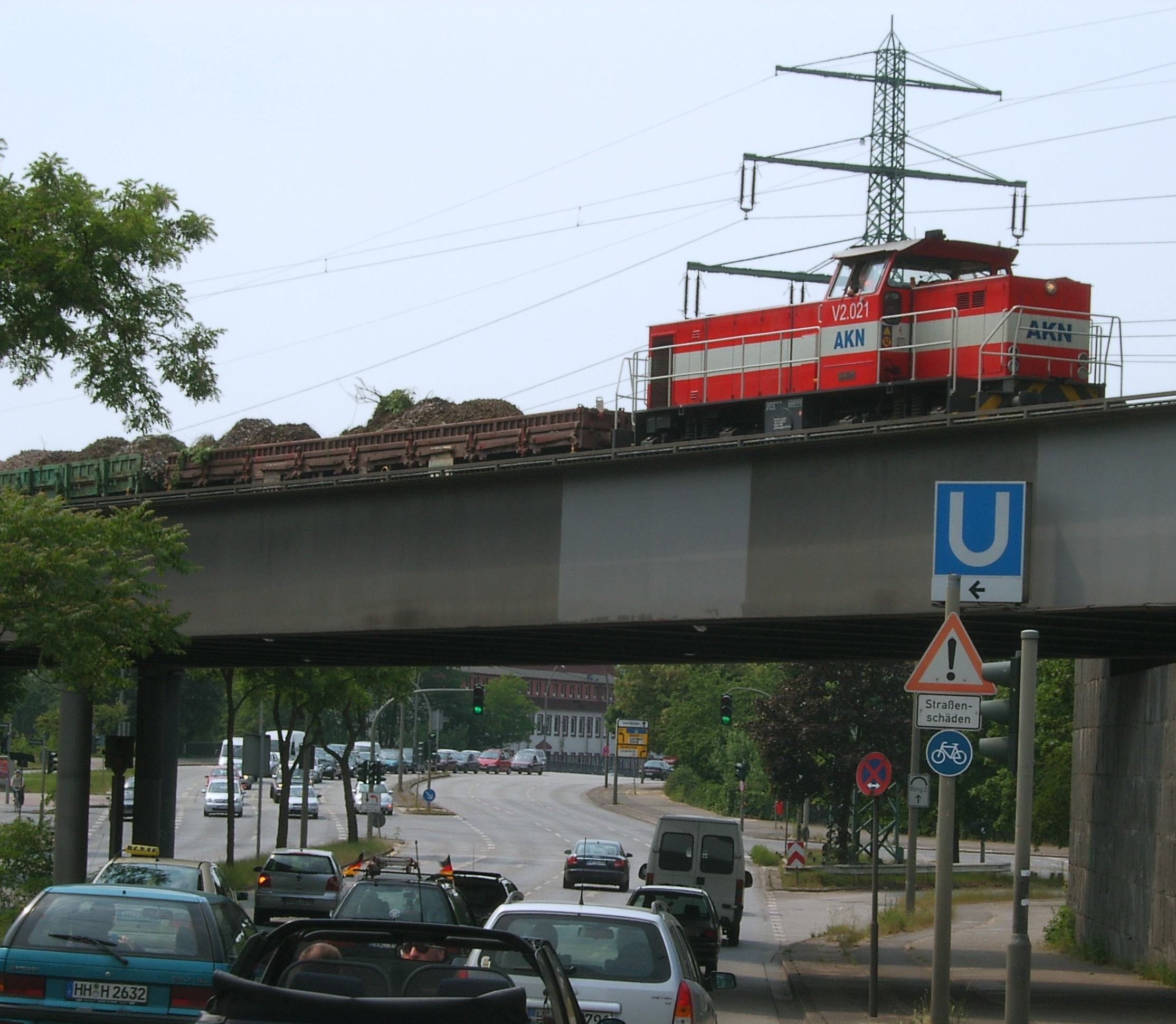 Brücke der U-Bahn (Linie U1) und der Güterumgehungsbahn über den Braamkamp im Verlauf des Ring 2 (Mittlerer Straßenring) in Winterhude. Auf der Brücke befindet sich die Lokomotive V2.021 der AKN.